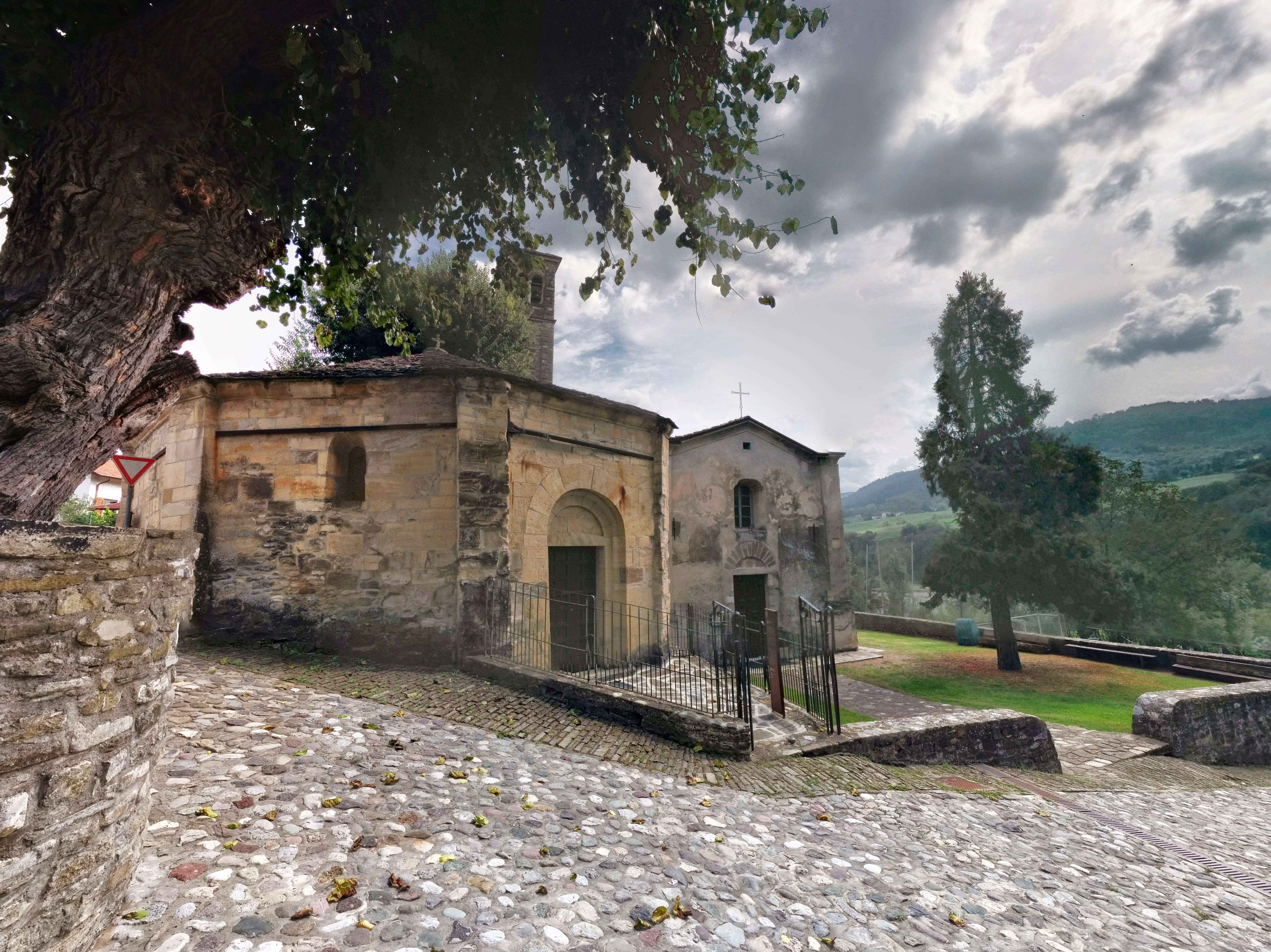 Battistero This is a photo of a monument which is part of cultural heritage of Italy.